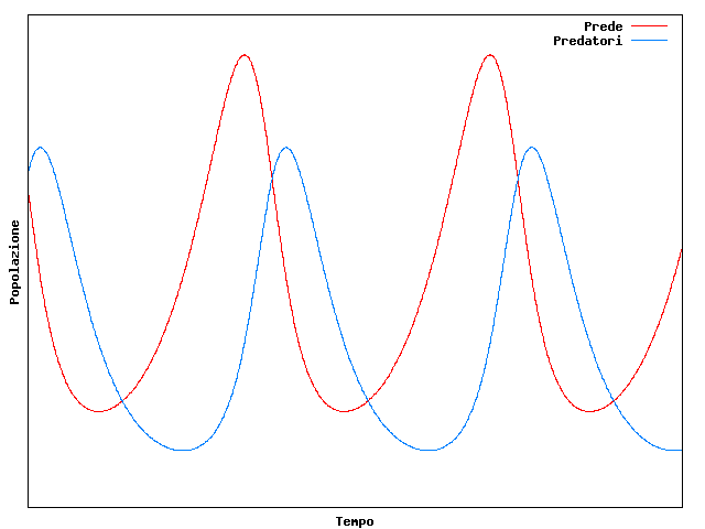 Lotka-Volterra predator-prey time series